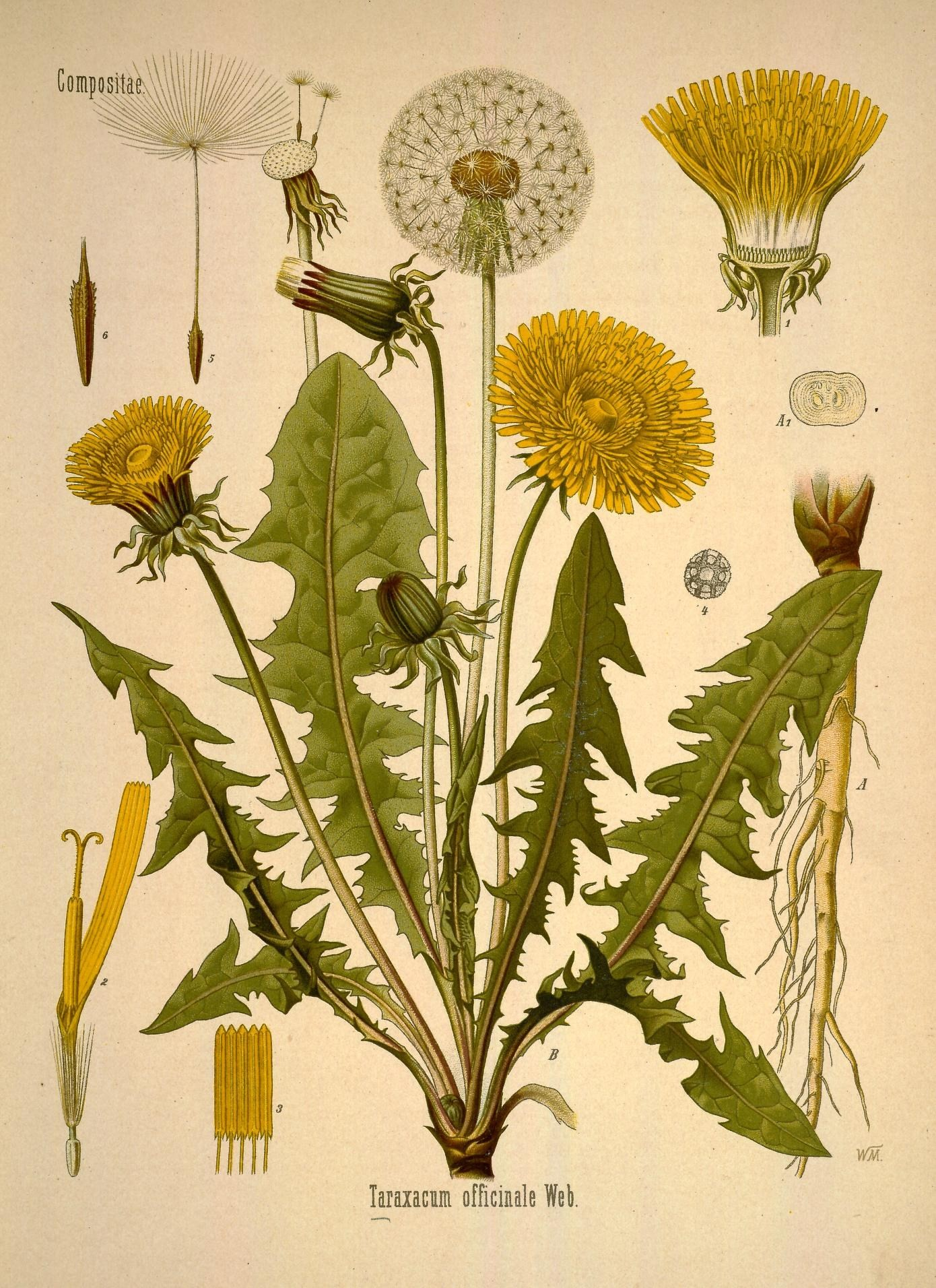 Löwenzahn. A unterirdischer, B oberirdischer Theil der Pflanze in natürl. Grösse; A1 Wurzelquerschnitt, desgl.; 1 Blüthenkopf im Längsschnitt, desgl.; 2 einzelne Blüthe, vergrössert; 3 Staubbeutelrohr, längsgespalten und ausgebreitet, desgl.; 4 Pollenkorn, desgl.; 5 Achäne mit gestielter Federkrone (pappus), desgl.; 6 Achäne, ohne Federkrone, stärker vergrössert.